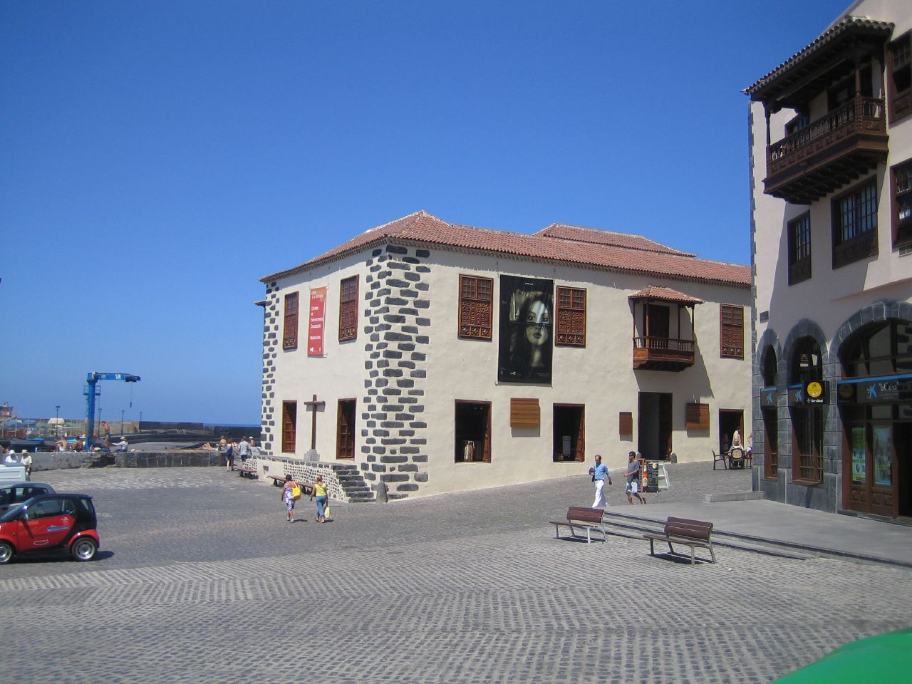 Casa de la Aduana, Puerto de la Cruz, Tenerife, Canarias